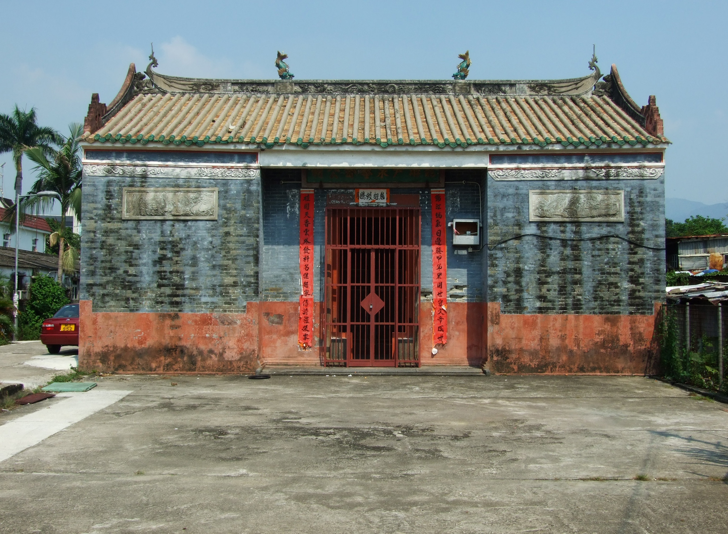 中文（香港）: 龍游尹泉菴鄧公祠